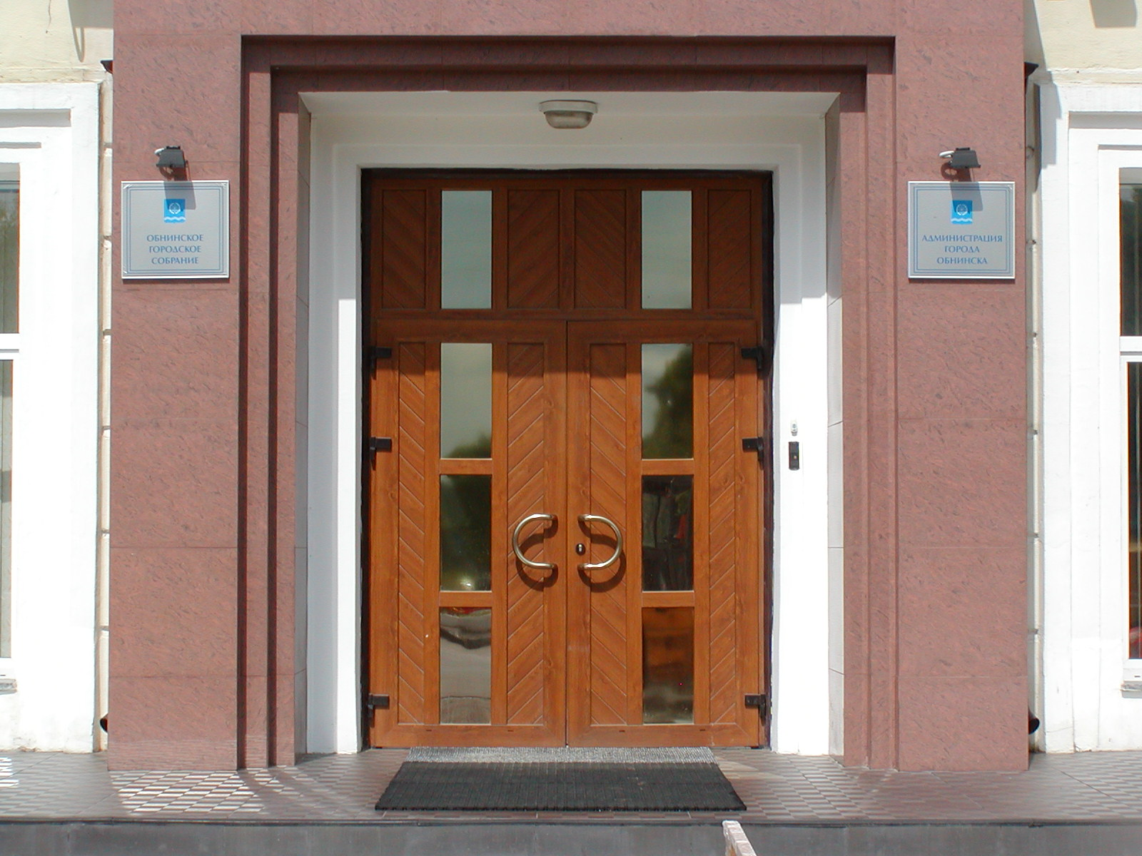 Главный вход в здание Обнинского городского Собрания и администрации города Обнинска